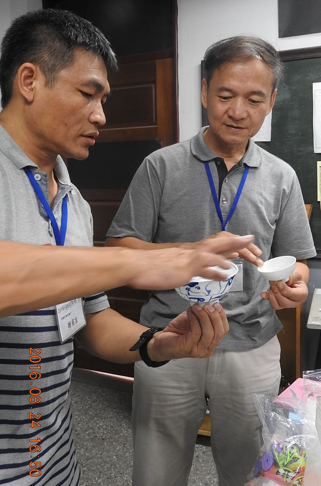 謝甫宜老師與陳秋民教授討論如何利用「響盃」示範聲波共振。 謝甫宜老師為高雄市陽明國中自然科教師，2012 年物理教育教學獎得主。陳秋民教授為東吳大學物理學系教授，2006 年物理教育研究獎與 2011 年物理教育推廣獎得主。